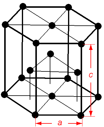 Deze hexagonale kristalstructuur van magnesium heb ik zelf gemaakt aan de hand van een voorbeeld uit een boek; om precies te zijn aan de hand van fig. 1.3a uit magnesium and its alloys, C. Sheldon Roberts, Fairchild semiconductor corporation, palo alto, california, John Wiley & Sons, Inc. (1960)